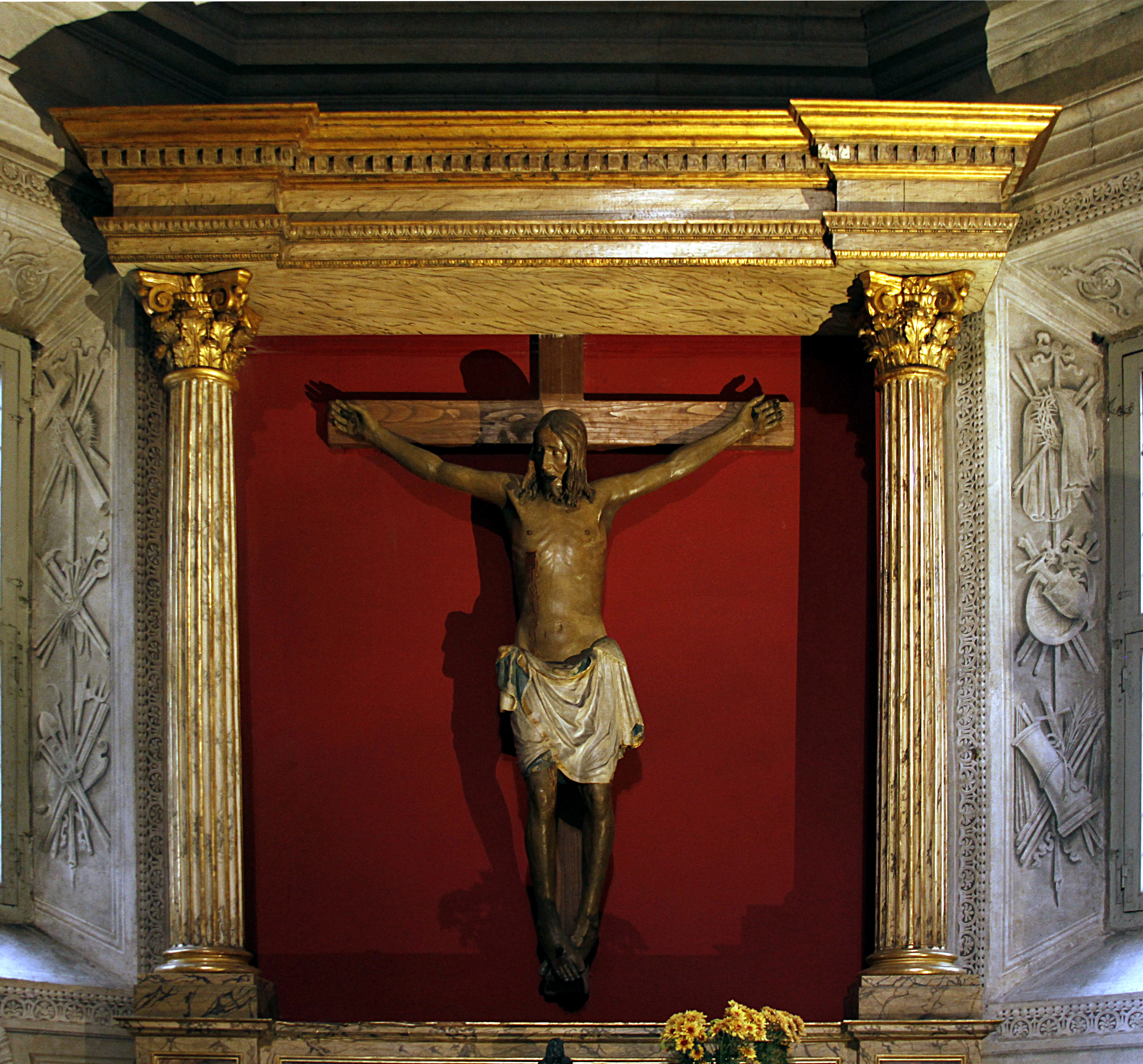 Santa Maria del Popolo - Rome